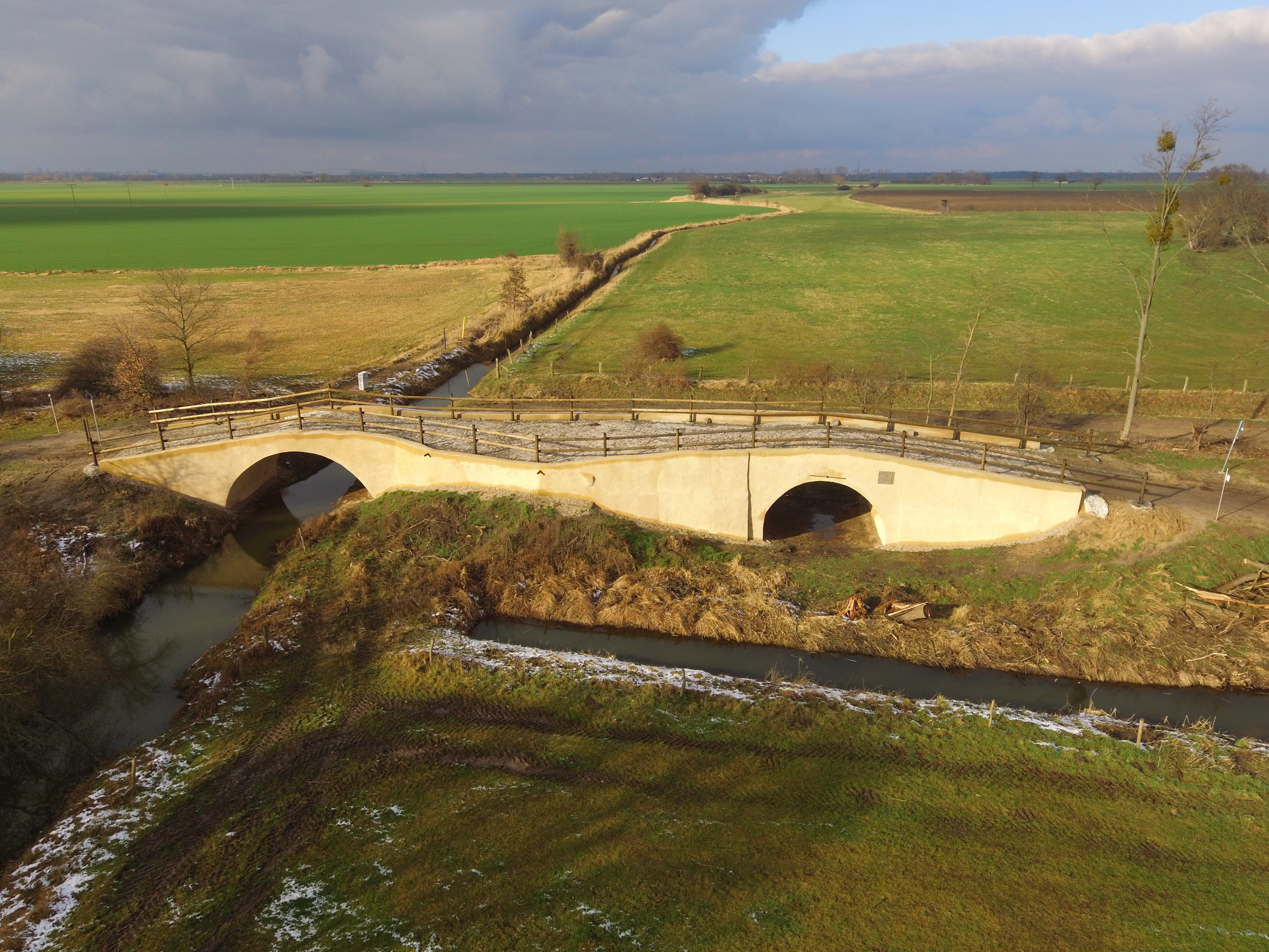 Klusbrücke